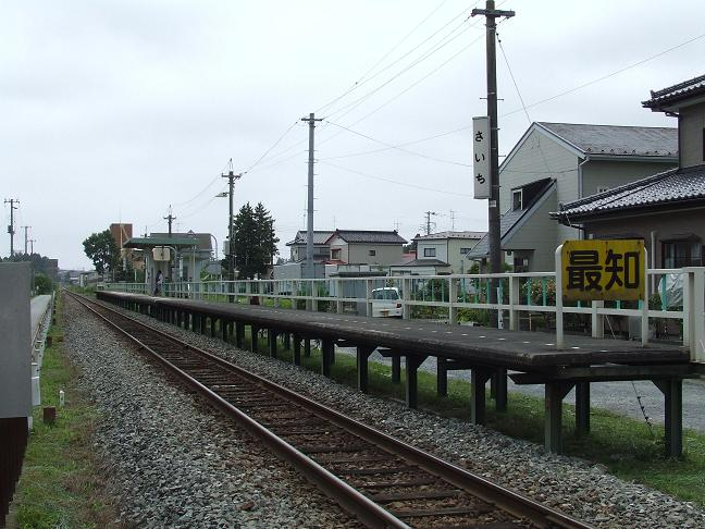 JR最知駅